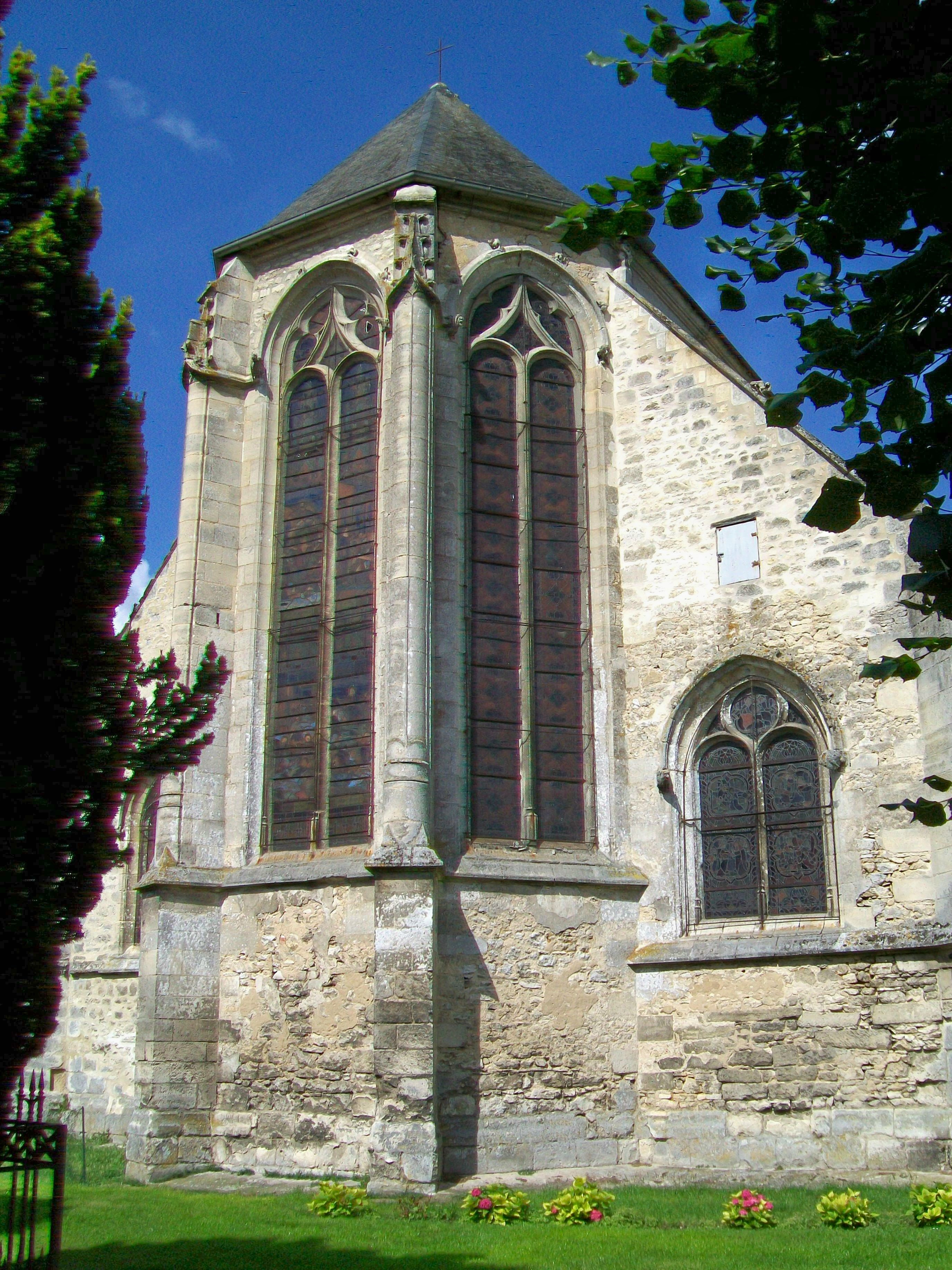 Le chœur flamboyant de l'église Saint-Germain, vu depuis l'est.